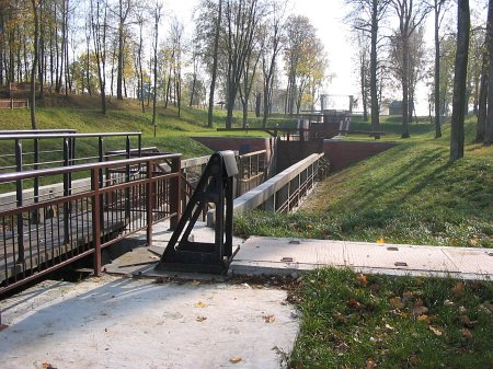 Немново, шлюз "Немново" Августовского канала This work is free and may be used by anyone for any purpose. If you wish to use this content, you do not need to request permission as long as you follow any licensing requirements mentioned on this page.